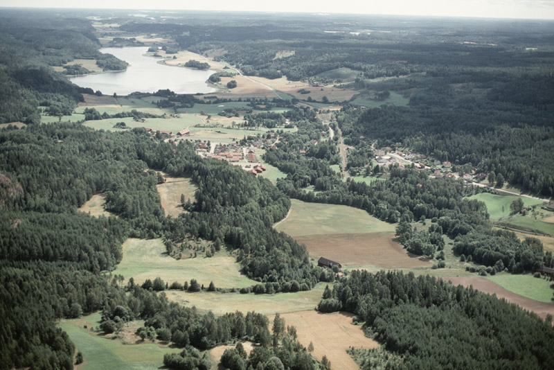 Vy mot Falerums by i Uknadalen. Bilden är tagen mot (väderstreck): SO Motiv: Falerum Nyckelord: Flygbilder, Riksintressen Kategori: Insjömiljöer, Dalgångsbygd Vy mot Falerums by i Uknadalen. Bilden är tagen mot (väderstreck): SO.